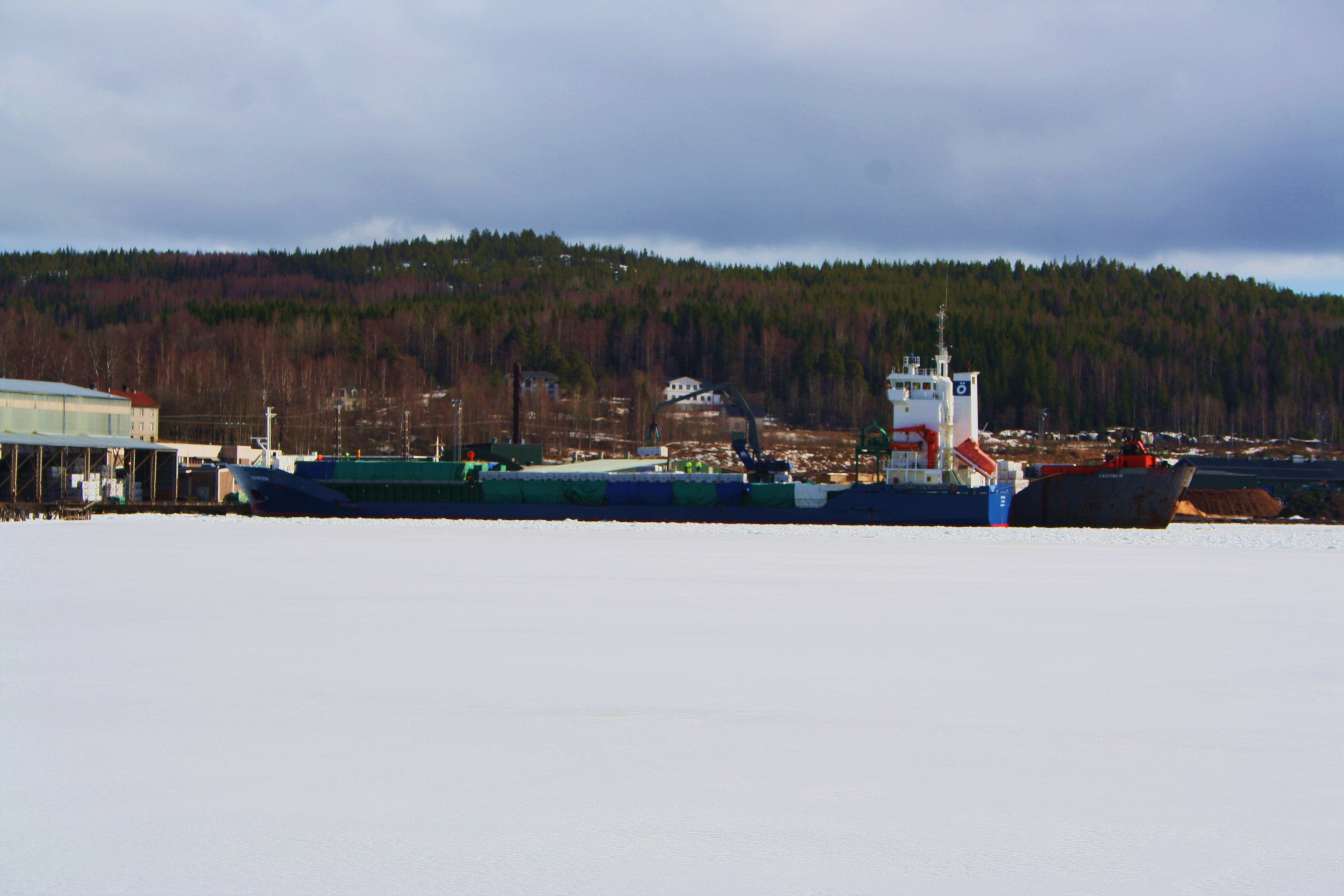 Lugnviks hamn